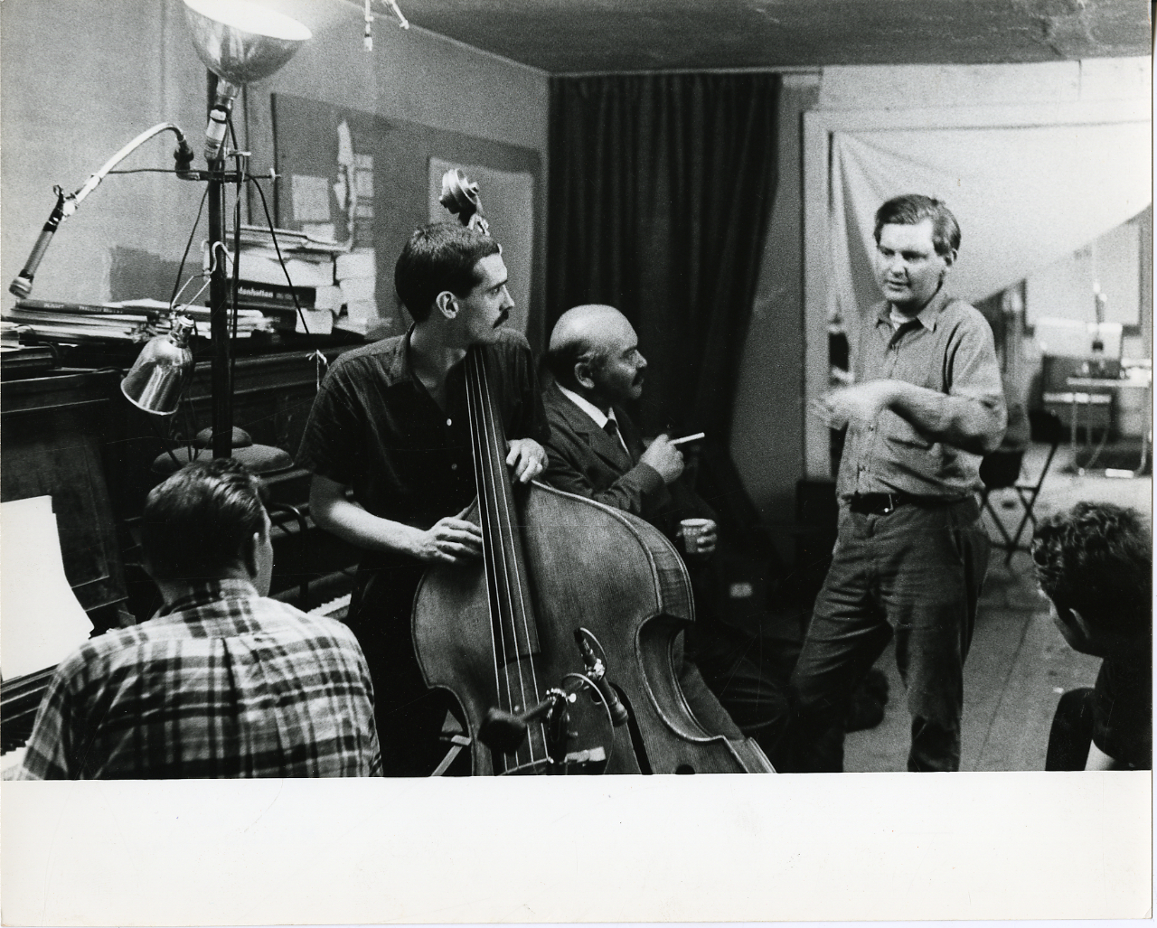 New York. New Rochelle. Jam session da W.E. Smith. Serie fotografica : New York, 1960 / Paolo Monti. - Stampe: 8 : Positivo b/n, gelatina bromuro d'argento/ carta, 24x30. - ((Al verso di una stampa manoscritto: "Sig. Martinez Nuova York". Sul coperchio della scatola manoscritto: "Figure - Luna Park".